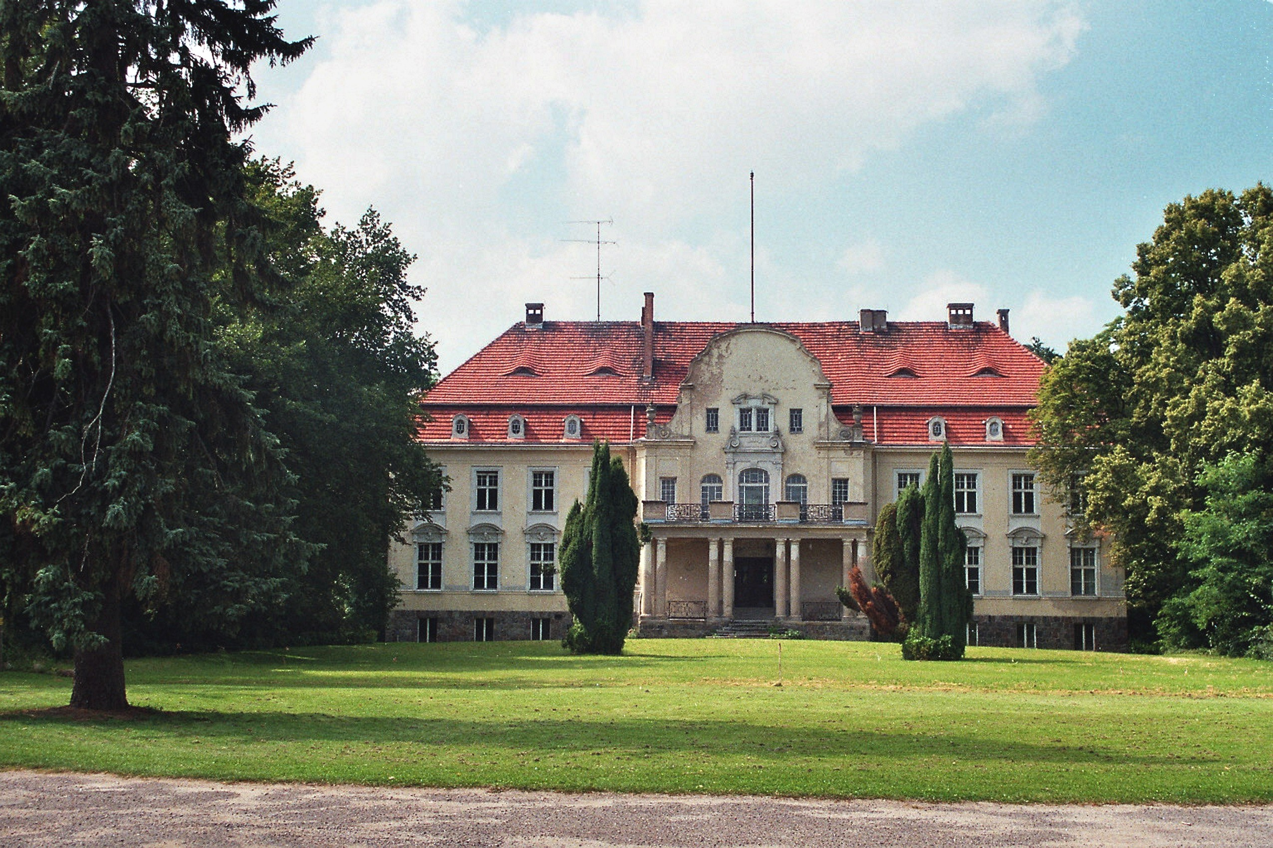 Gutshaus in Puchow, Parkstraße, Landkreis Mecklenburgische Seenplatte